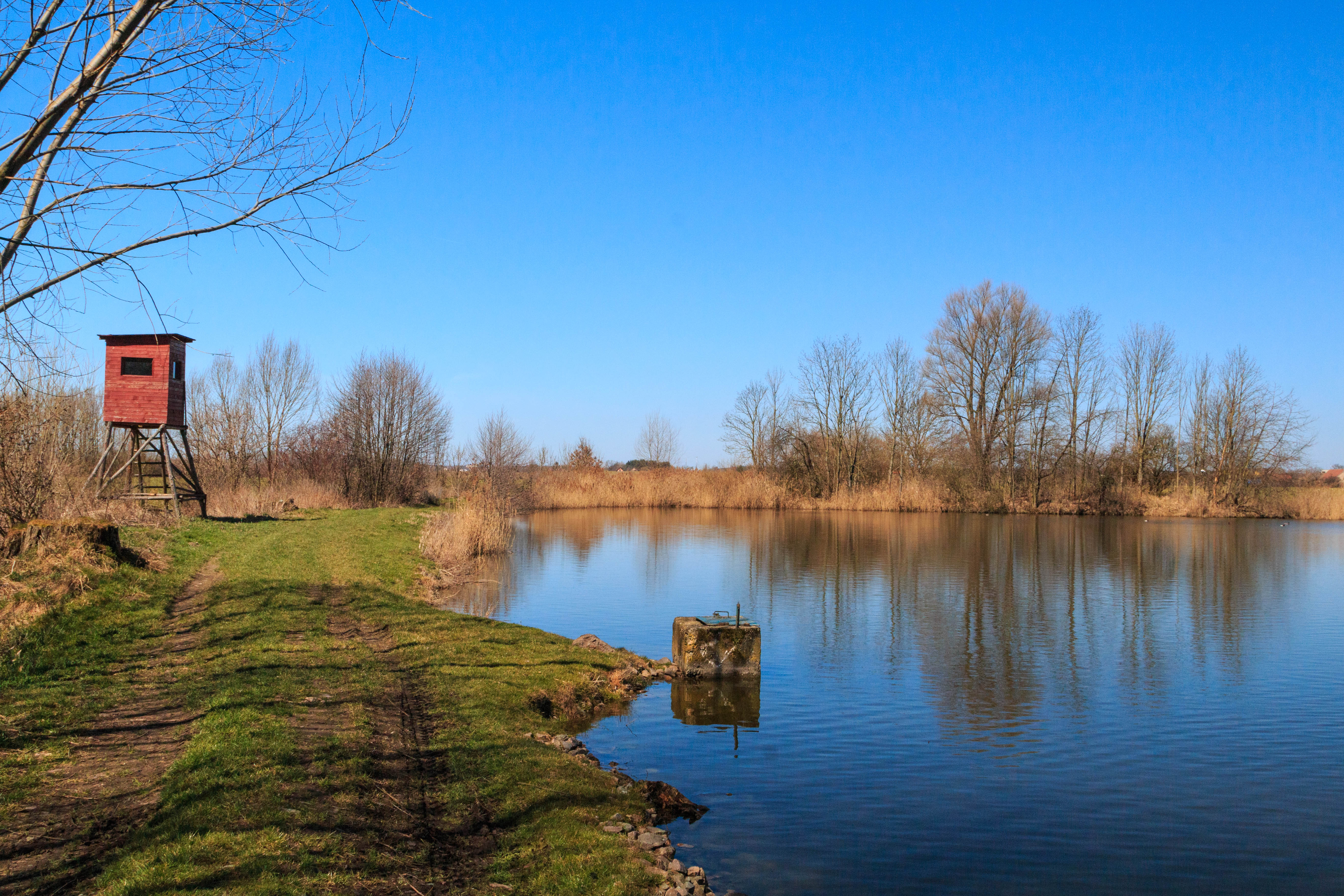 rybník Řepíček u Babice v okrese Hradec Králové Project: Vodstvo.